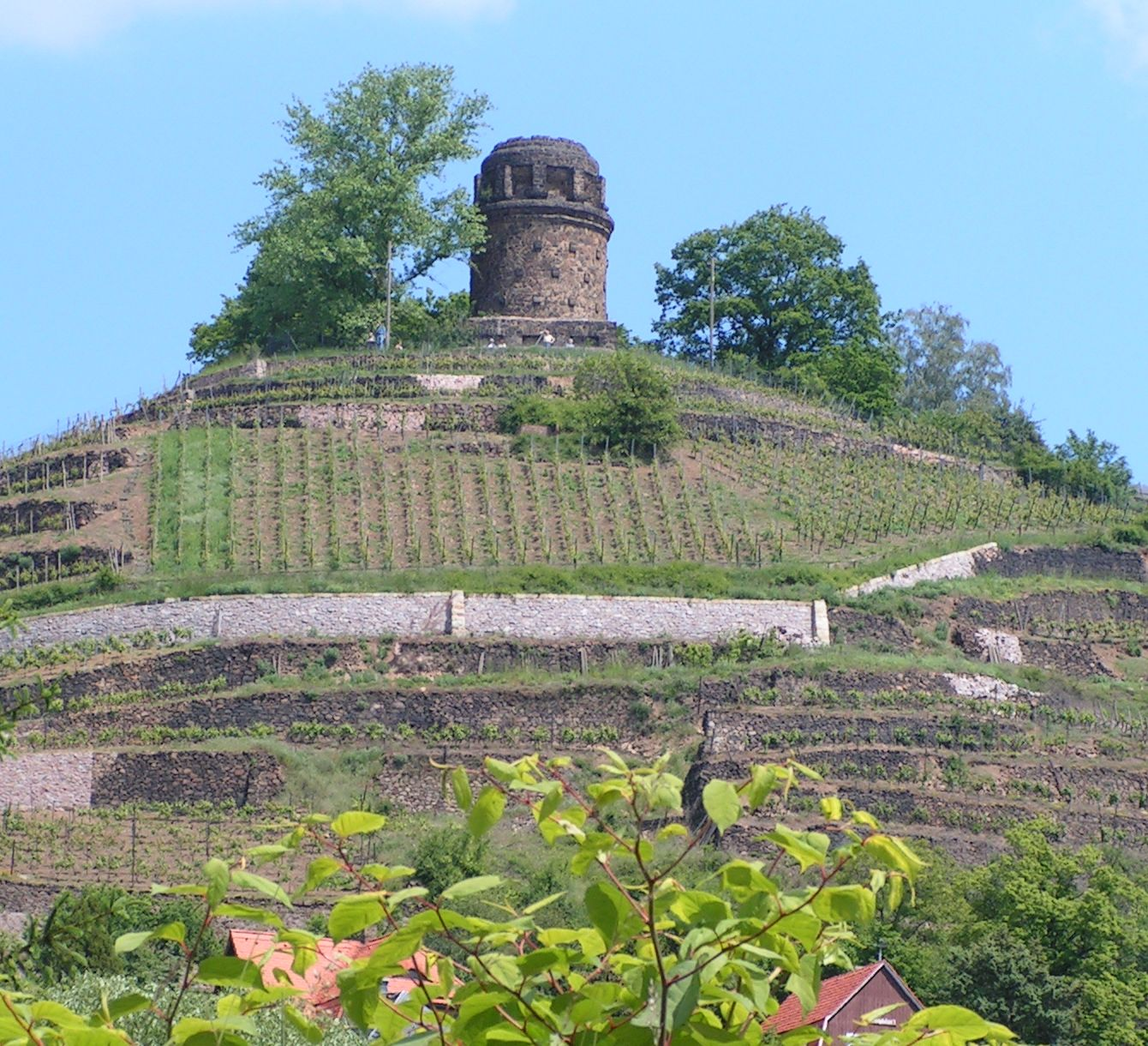 Bismarckturm, Radebeul, Germany